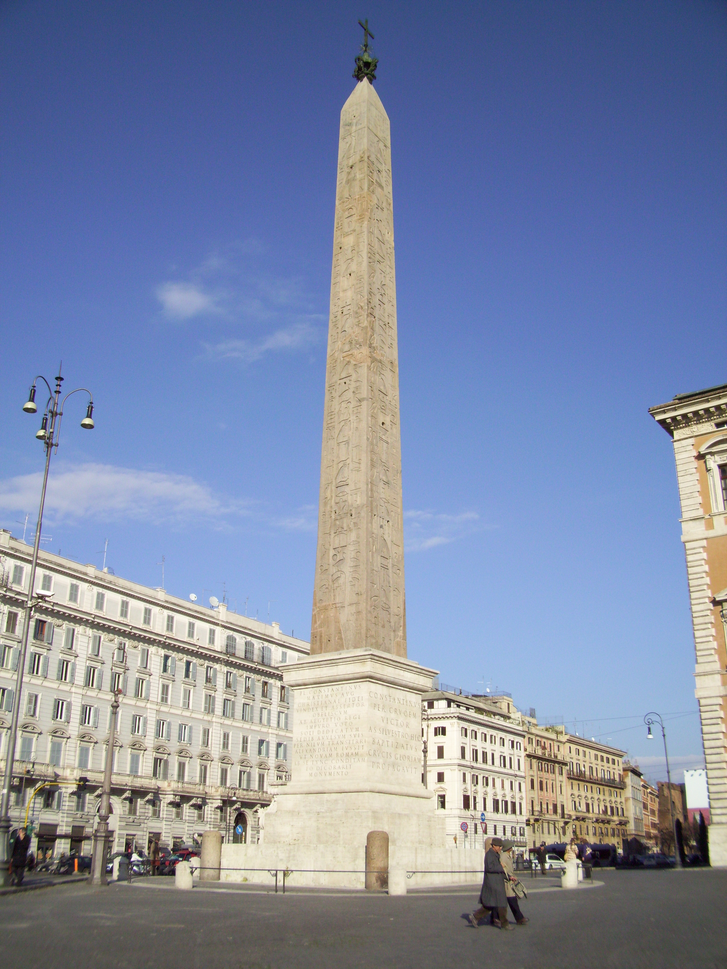 Obelisco lateranense dopo i restauri terminati nel 2008 - Piazza San Giovanni, Roma